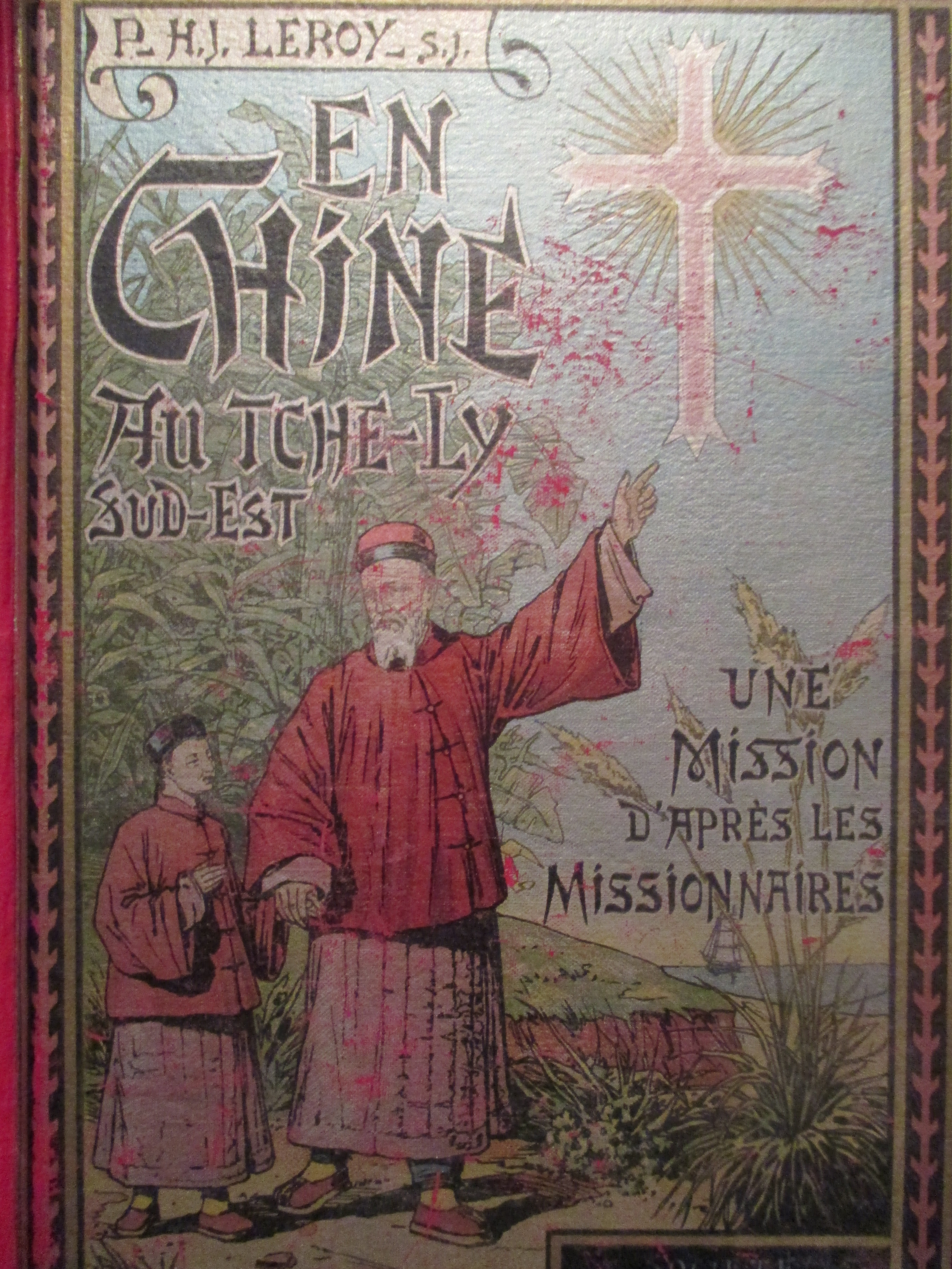 Couverture du livre du P. Henry-Joseph Leroy, s.j. En Chine au Tché-Ly Sud-Est. Une mission d'après les missionnaires, Bruges, éd. Desclée de Brouwer, 1900